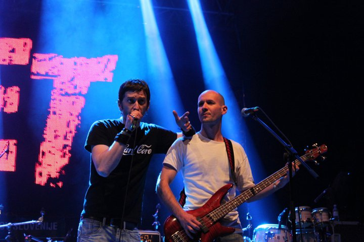 Niet na Škisovi tržnici